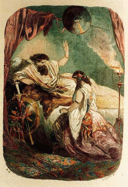 Ilustracja do "Grażyny" A. Mickiewicza